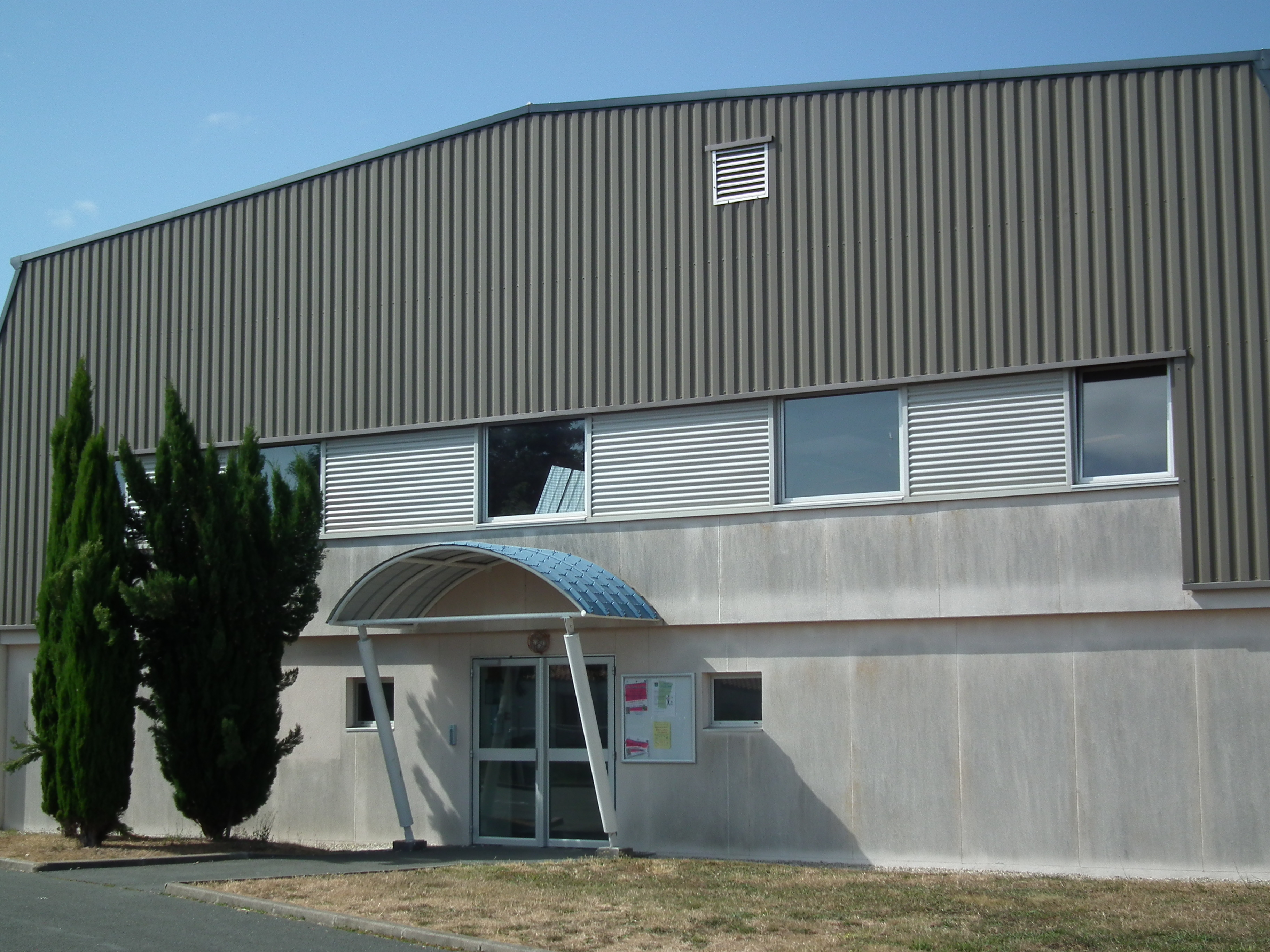 Salle omnisports de St Sulpice-de-Royan